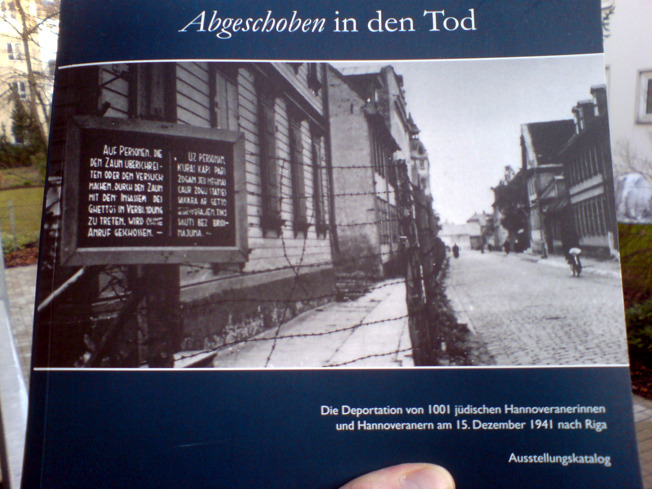 Der Ausstellungskatalog zur Ausstellung Abgeschoben in den Tod. Die Deportation von 1001 jüdischen Hannoveranerinnen und Hannoveranern am 15. Dezember 1941 nach Riga, Bürgersaal des Neuen Rathauses in Hannover vom 15. Dezember 2011 bis 27. Januar 2012. Hinsichtlich Urheberrechts-Bedenken: Das Foto ist ein "Kunstwerk mit Fingerzeig" und im Rahmen der Panoramafreit erlaubt. Im Übrigen liegt diese "Vervielfältigung" im Interesse der Veranstalter - bessere Digitalisate sind gerne erwünscht.